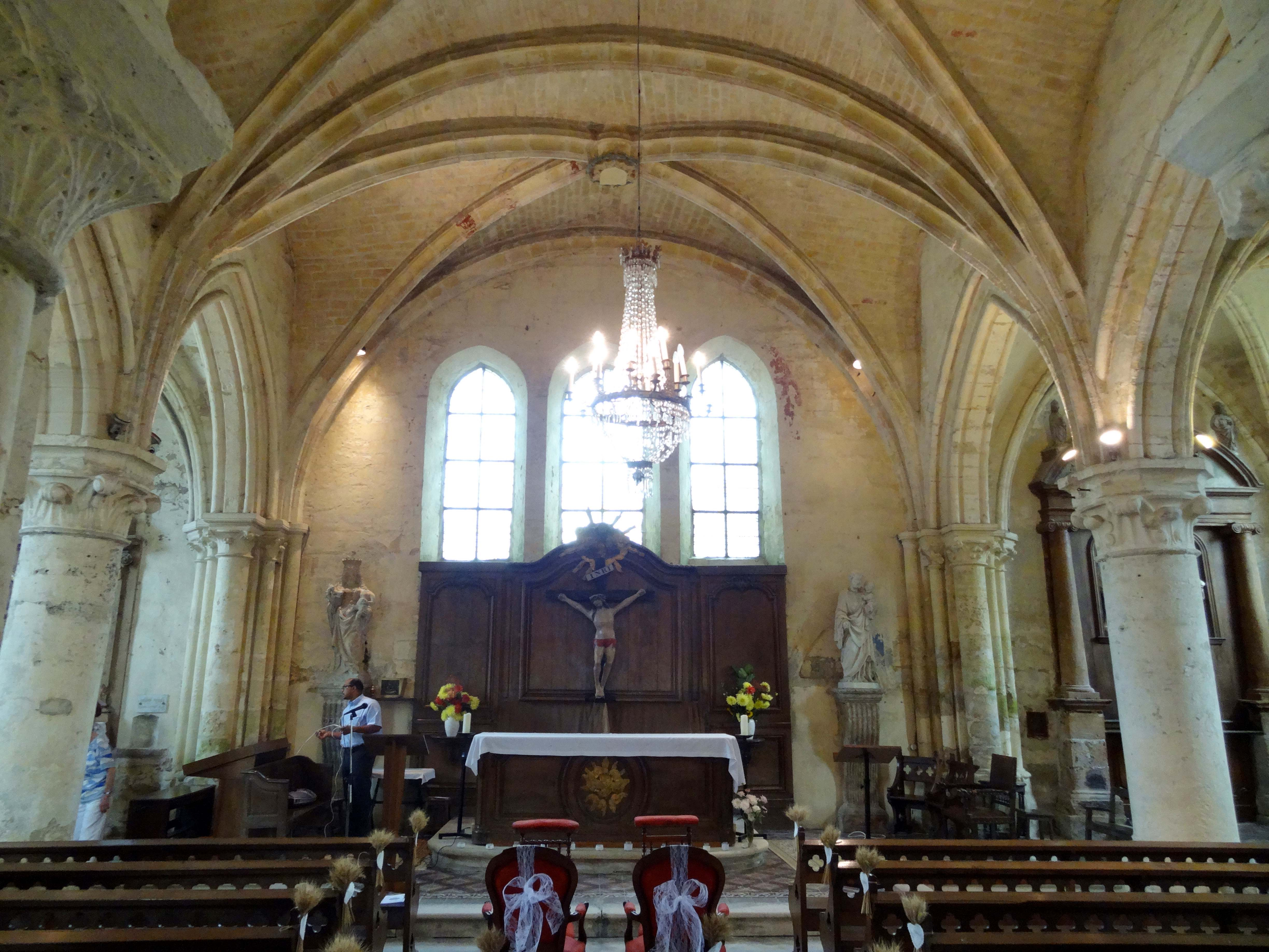 Intérieur de l'église - voir titre.